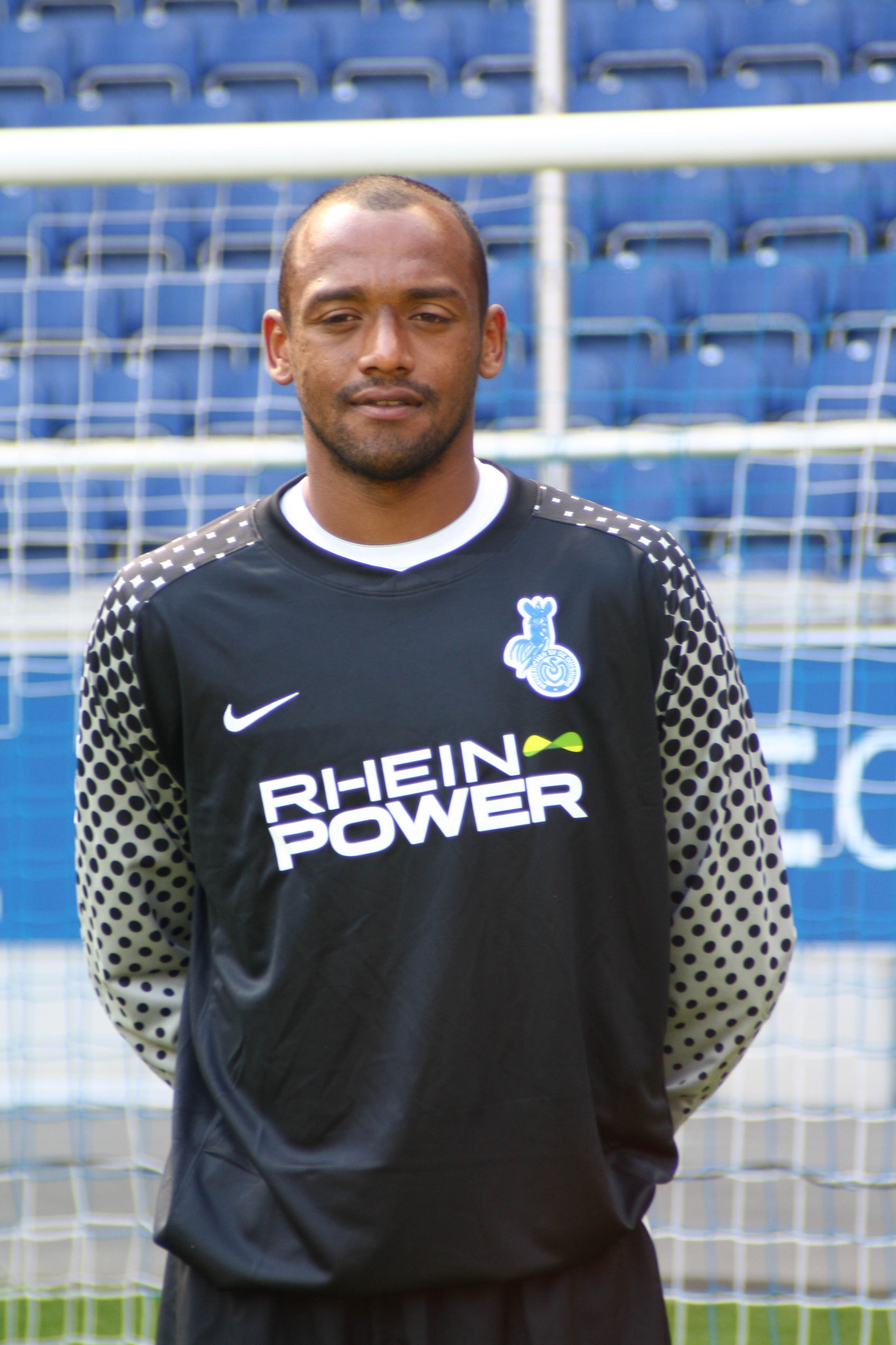 David Yelldell, MSV Duisburg